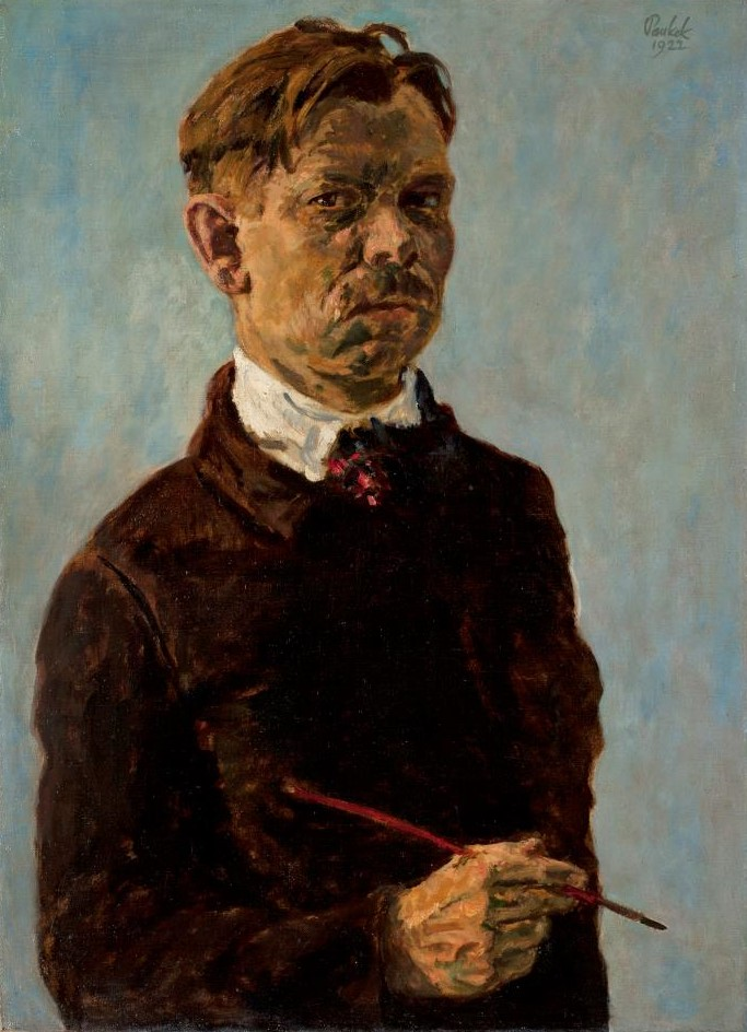 Bernhard Pankok - Selbstportrait mit Pinsel, 1922. Öl auf Leinwand. 78 x 56 cm. Dauerleihgabe aus der Kunstsammlung der Westfälischen Provinzial Versicherung Aktiengesellschaft